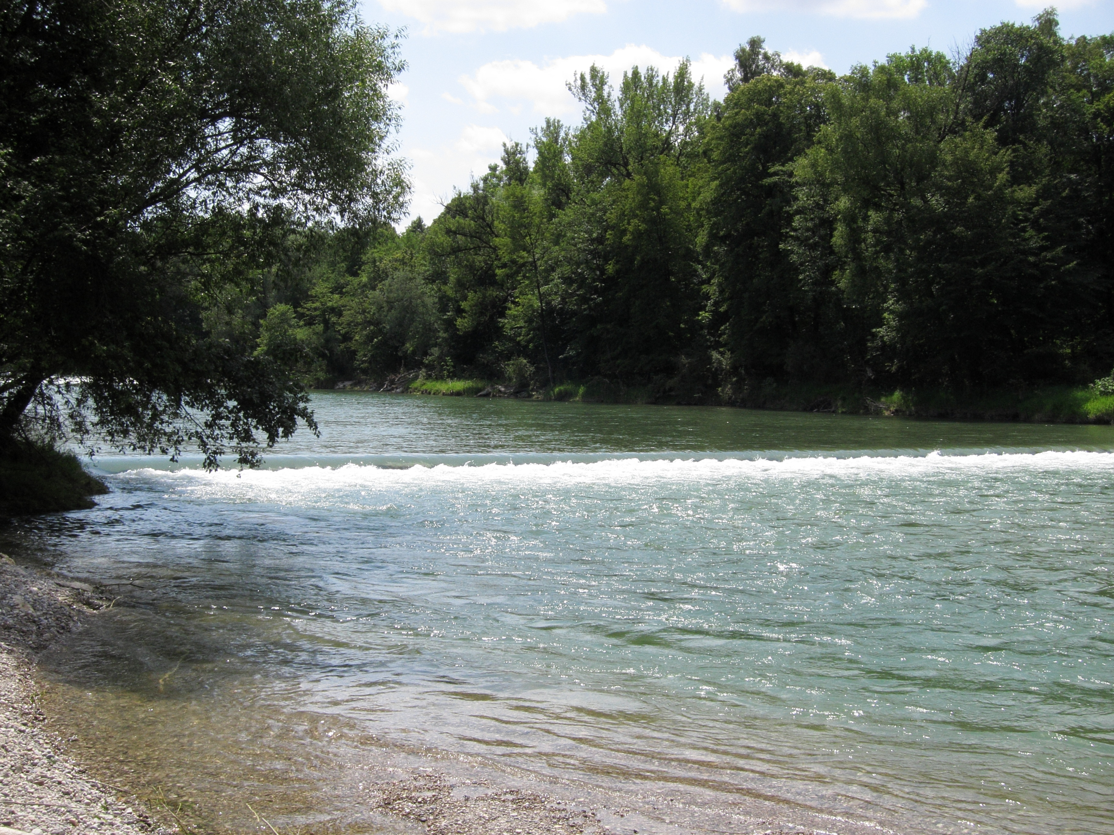 Schwelle in der Isar oberhalb des Poschinger Weihers